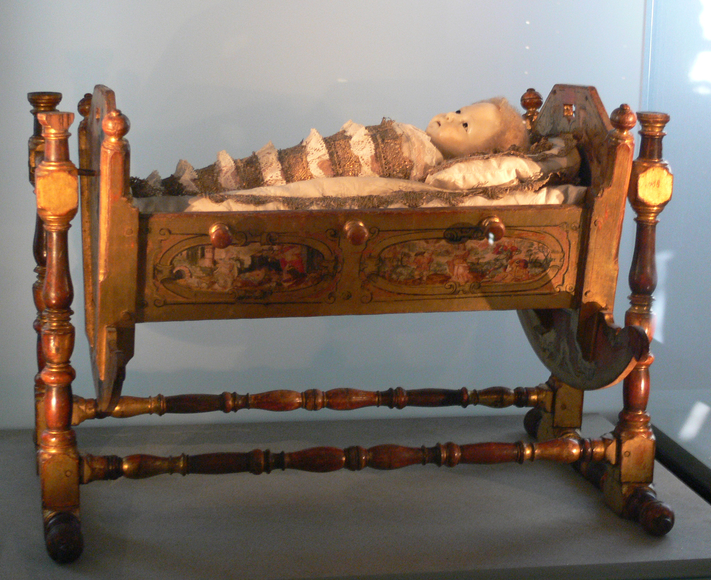 Wiege mit gewickeltem Jesuskind Wiege: Holz, Süddeutschland, 1585 Jesuskind: bossiertes Wachs, Süddeutschland 18. Jh. Krippensammlung des Bayerischen Nationalmuseums, München, Inv. Nr. R1688